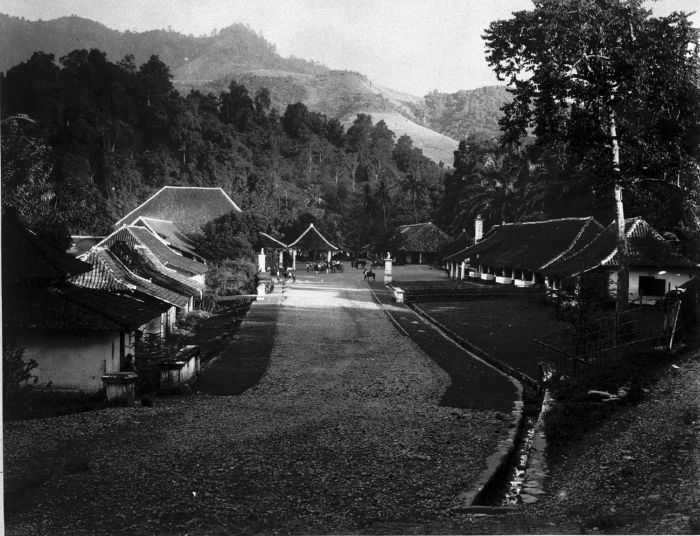 Foto. De koffieplantage Nanggoen bij Buitenzorg.